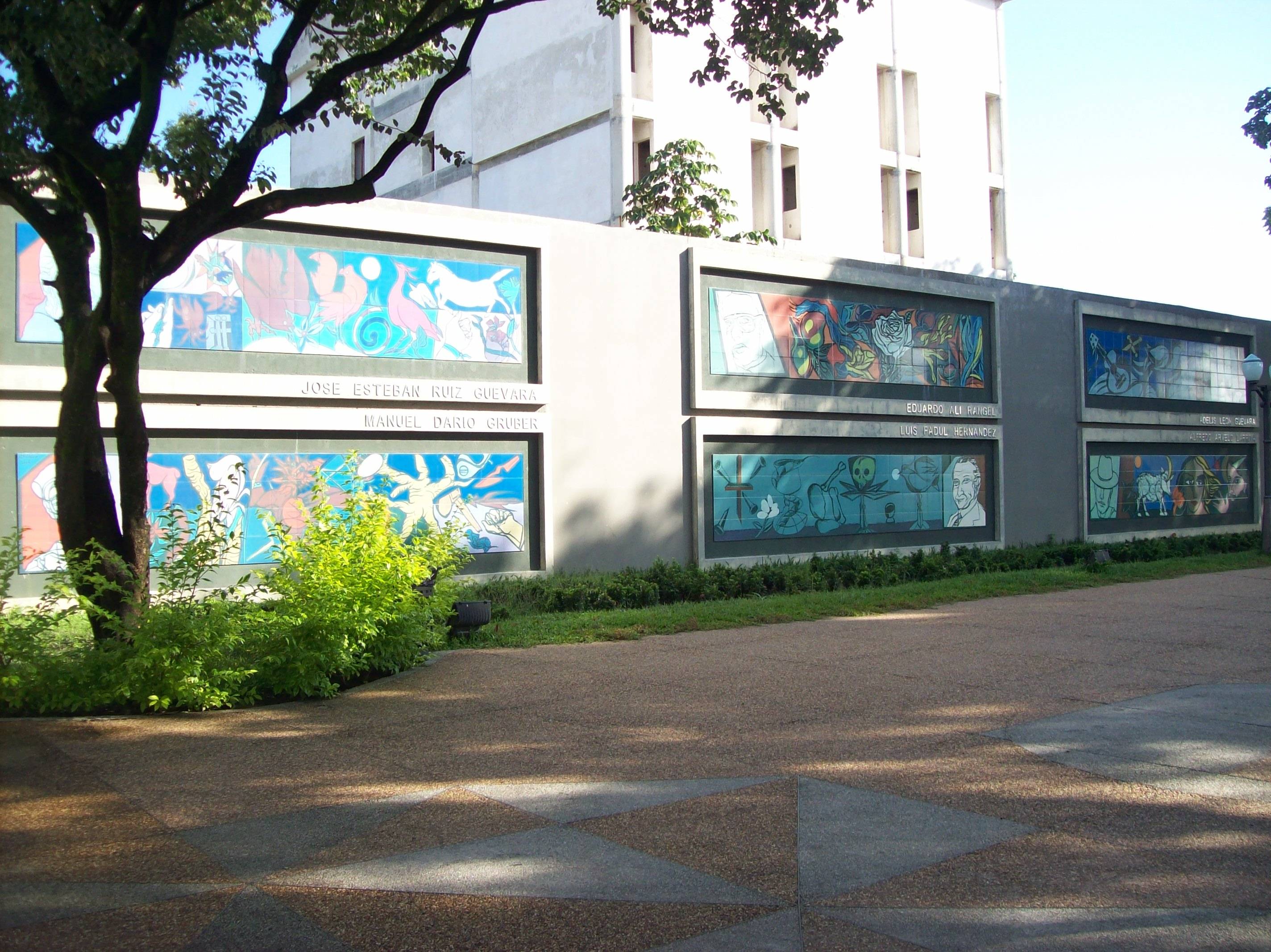 Plaza Luis Razetti (Plaza de los poetas) en Barinas, Venezuela